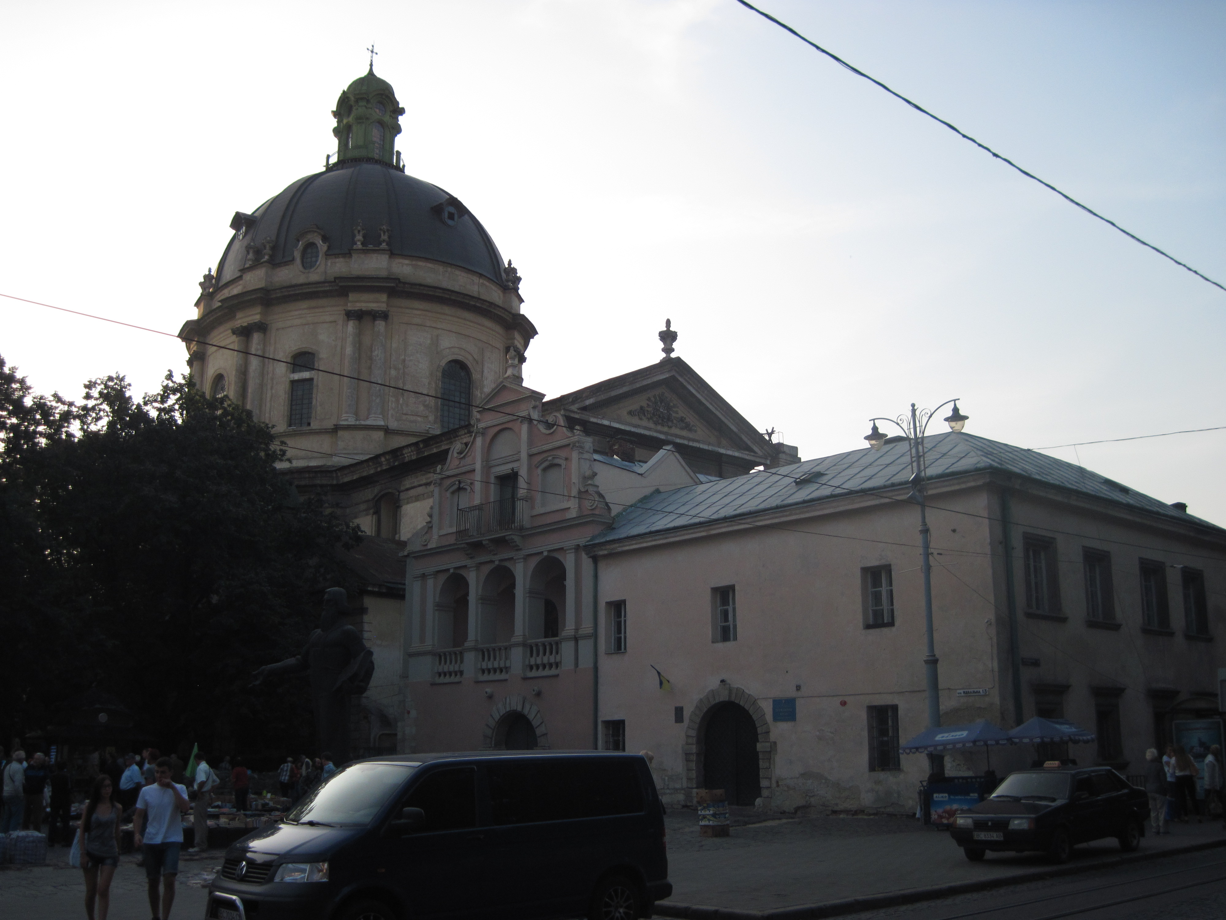 домнікани, королівський арсенал, 2014